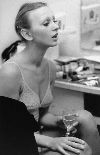 Jenny Gröllmann (aus dem Filmplakat ausgeschnitten)